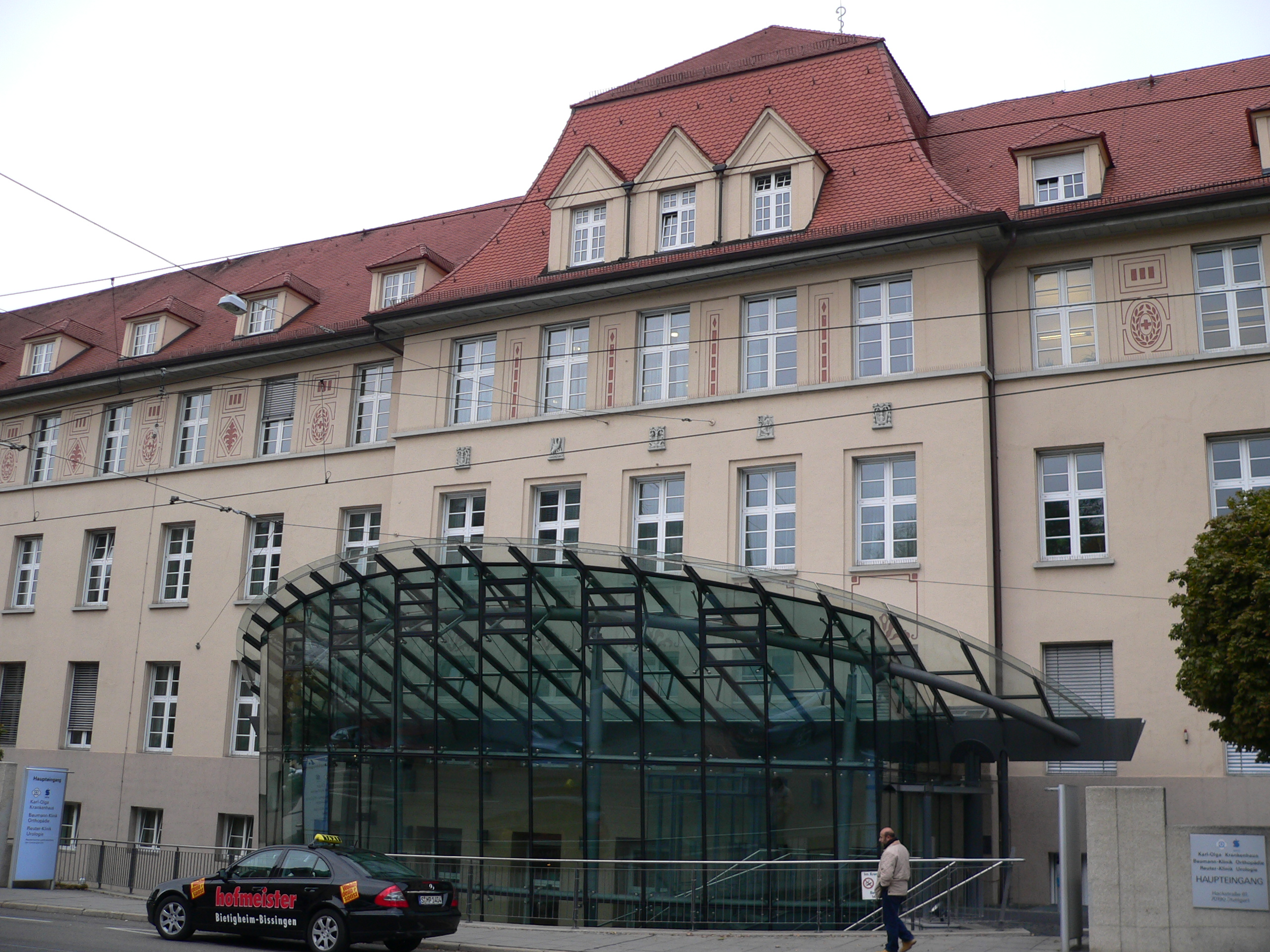 Haupteingang des Karl-Olga-Krankenhauses in der Hackstraße, in Stuttgart